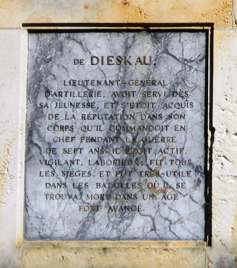 Gedenktafel für Karl Wilhelm von Dieskau (1701–1777) am Obelisken bei dem Schloss Rheinsberg